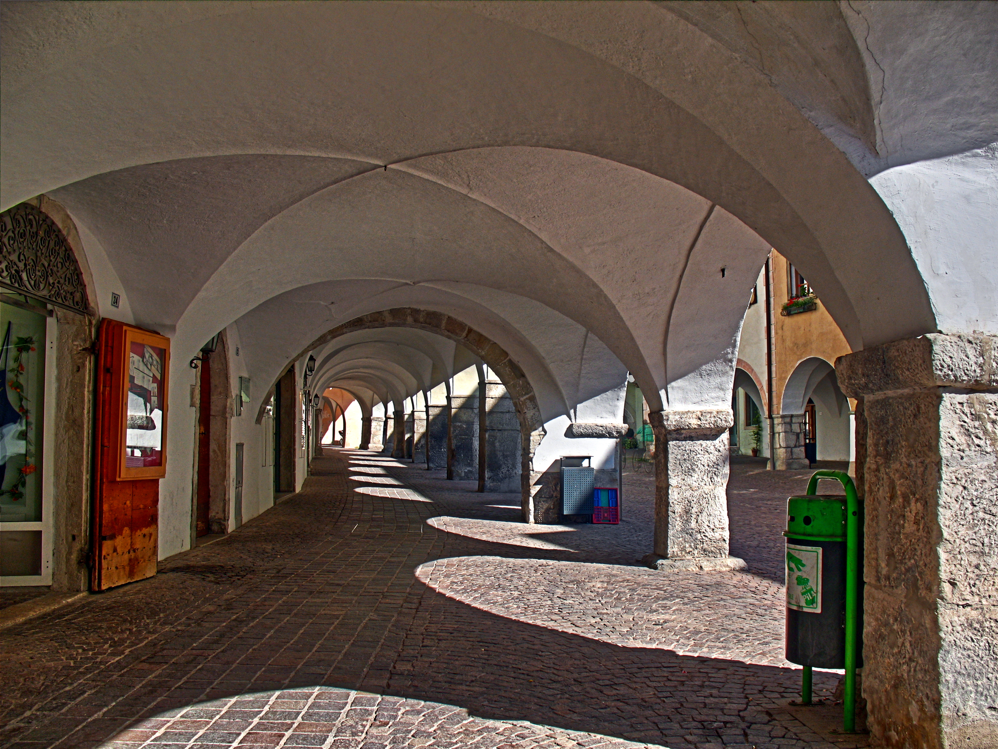 Italien, Südtirol, Neumarkt, Laubengänge, HDR